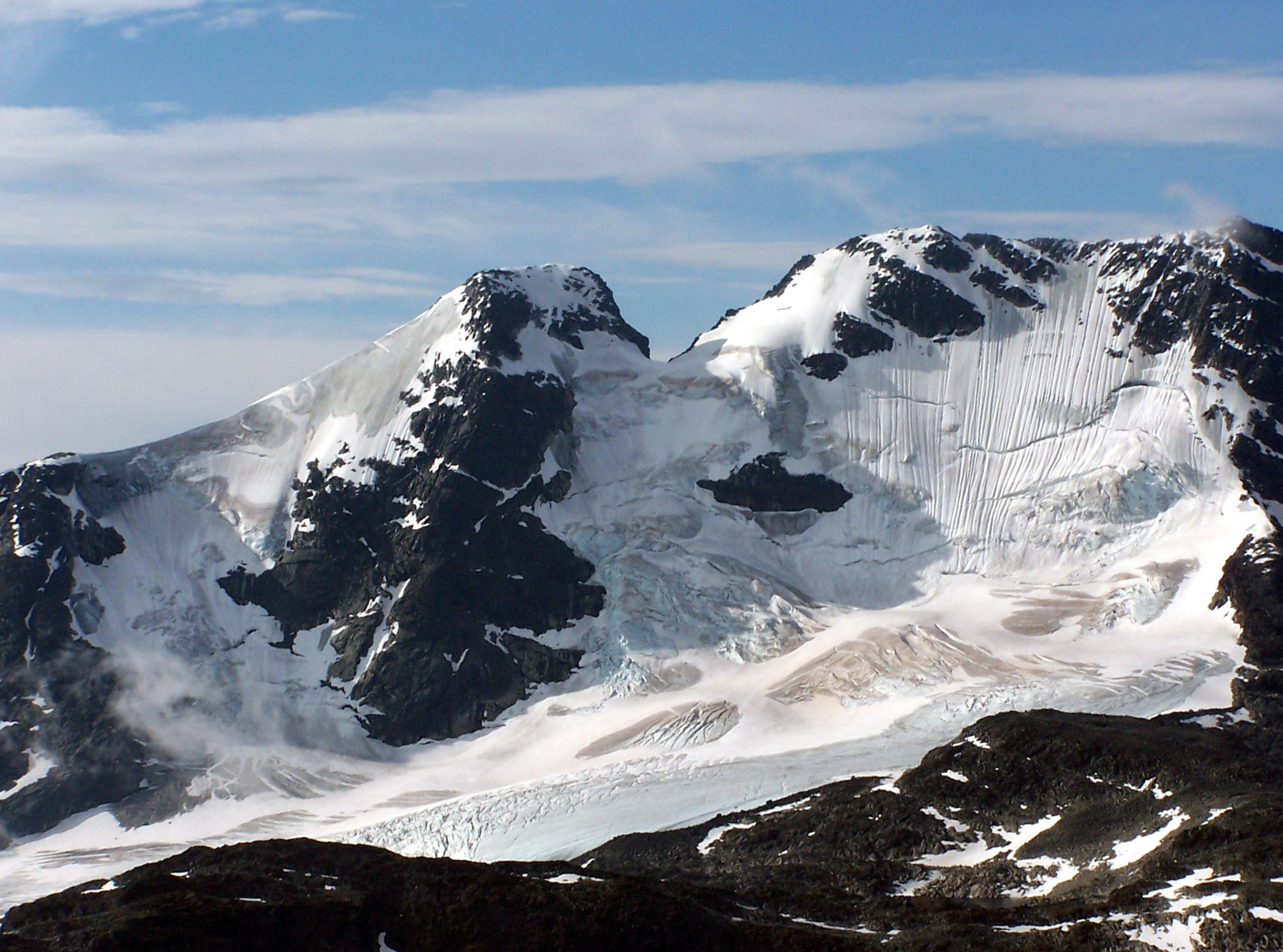 Jervvasstind seen from Fannaråki august 2004. Foto: Tore Røraas.